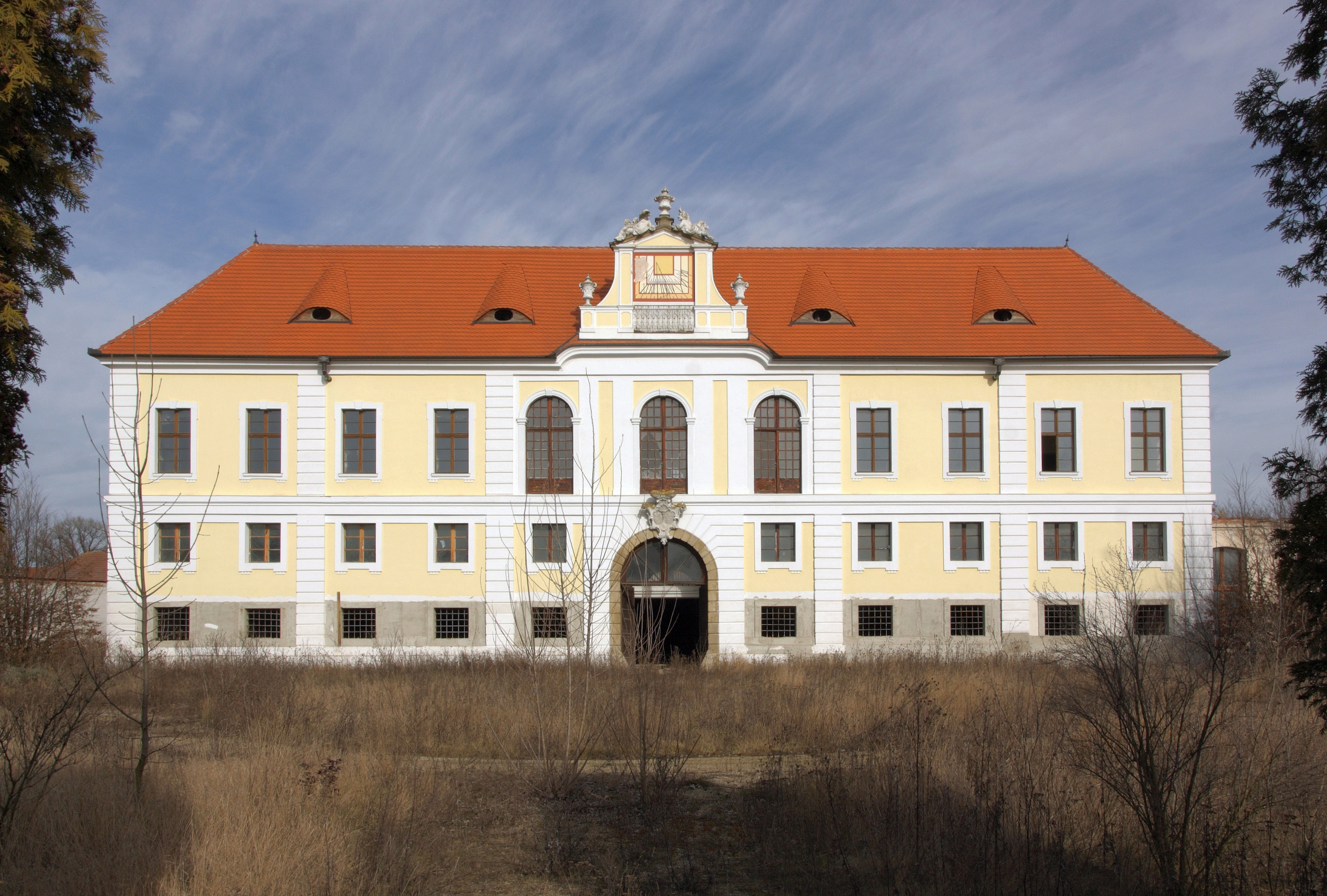 Kupařovice - zámek, hlavní průčelí.